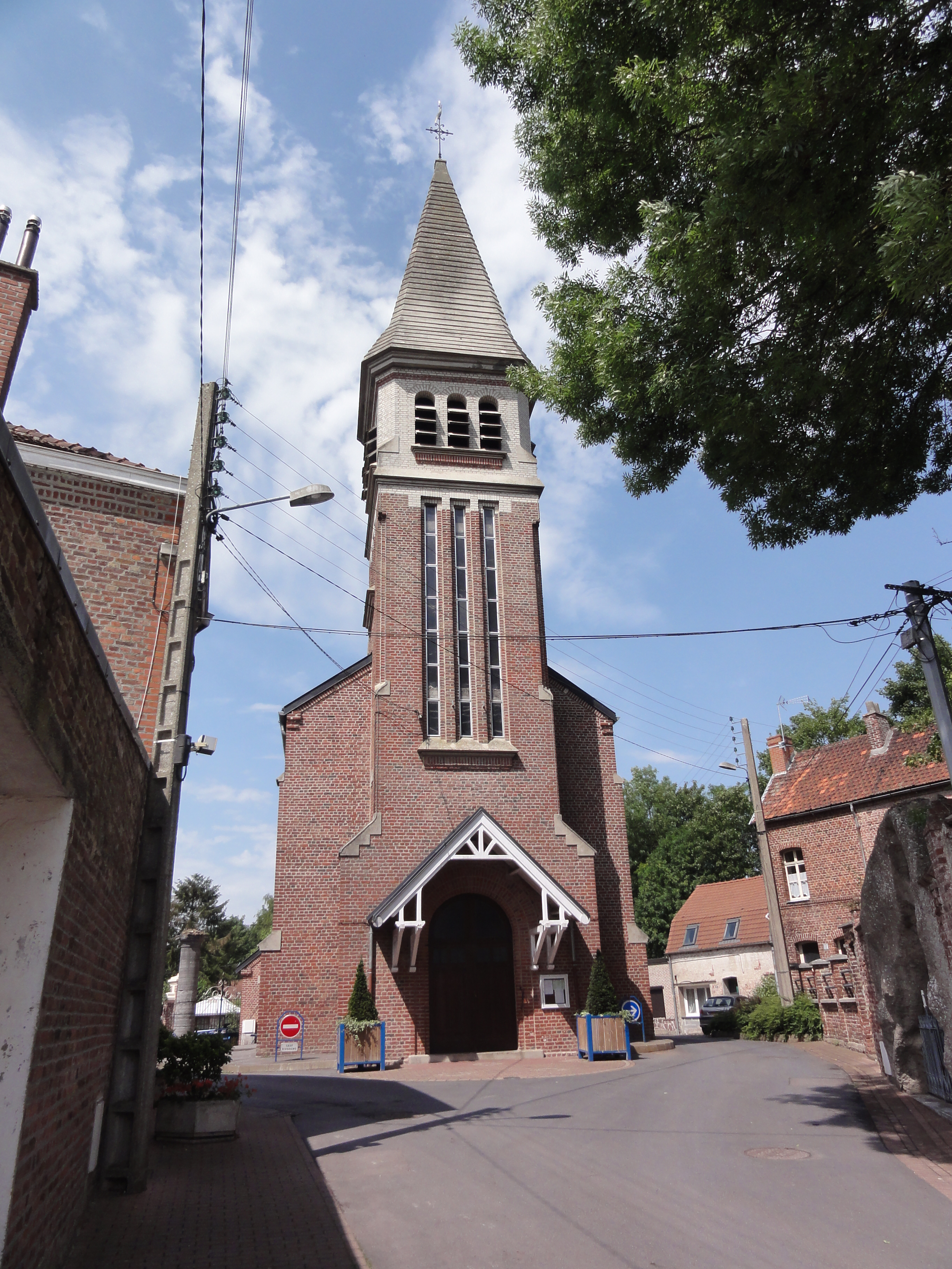 Famars (Nord,Fr) église de l'Assomption-de-Marie